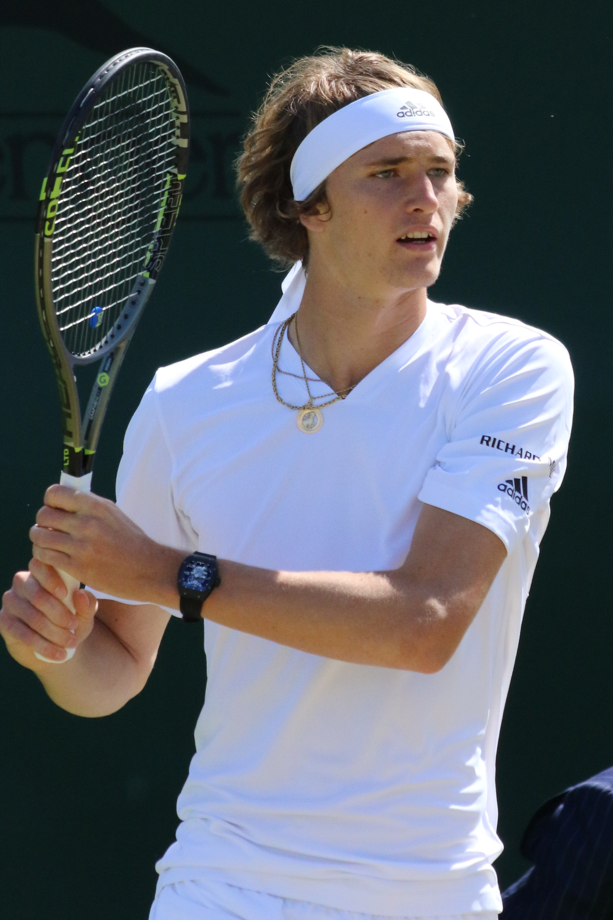 Zverev A. WM16 (37)